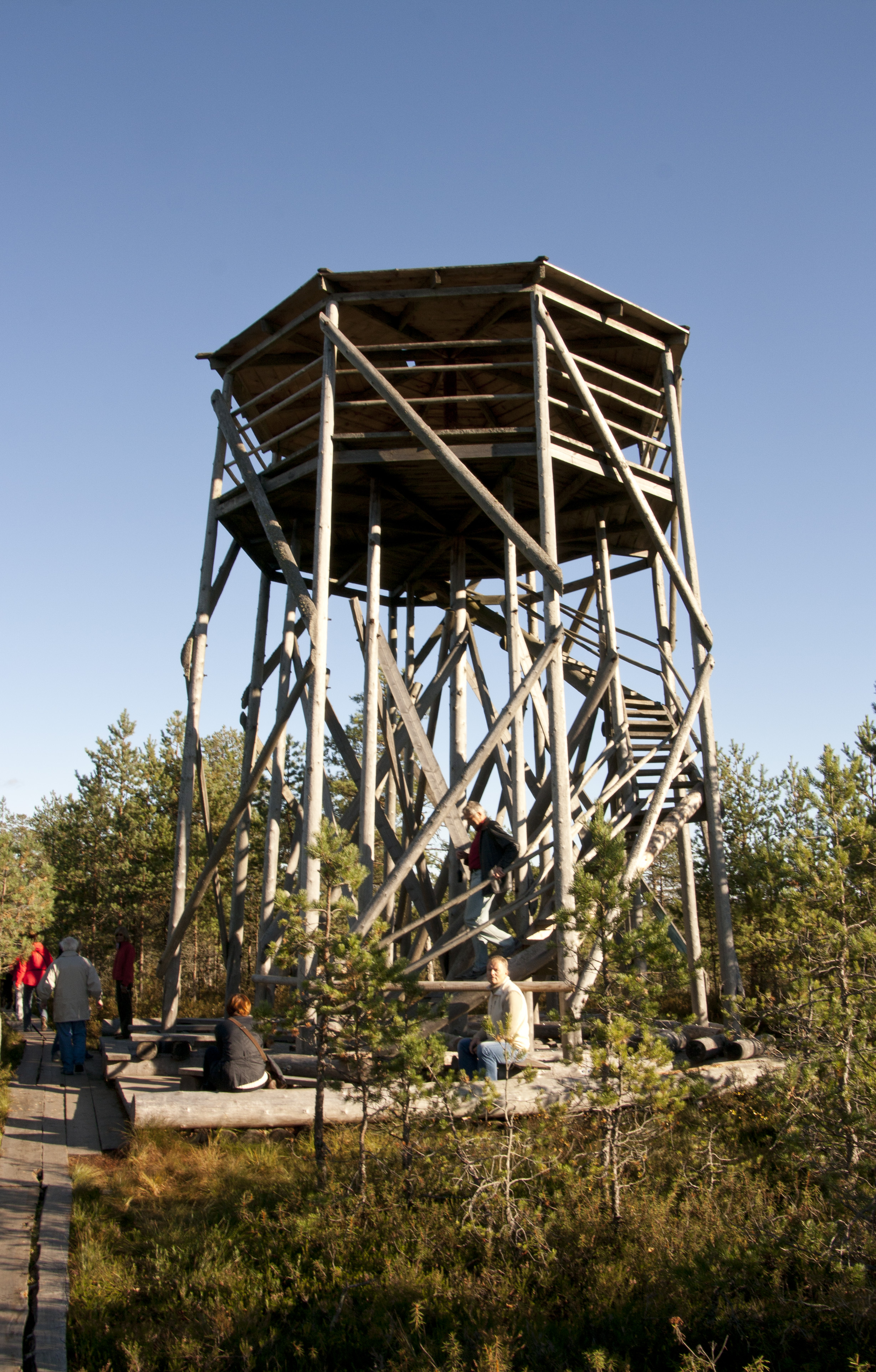 Viru raba vaatetorn